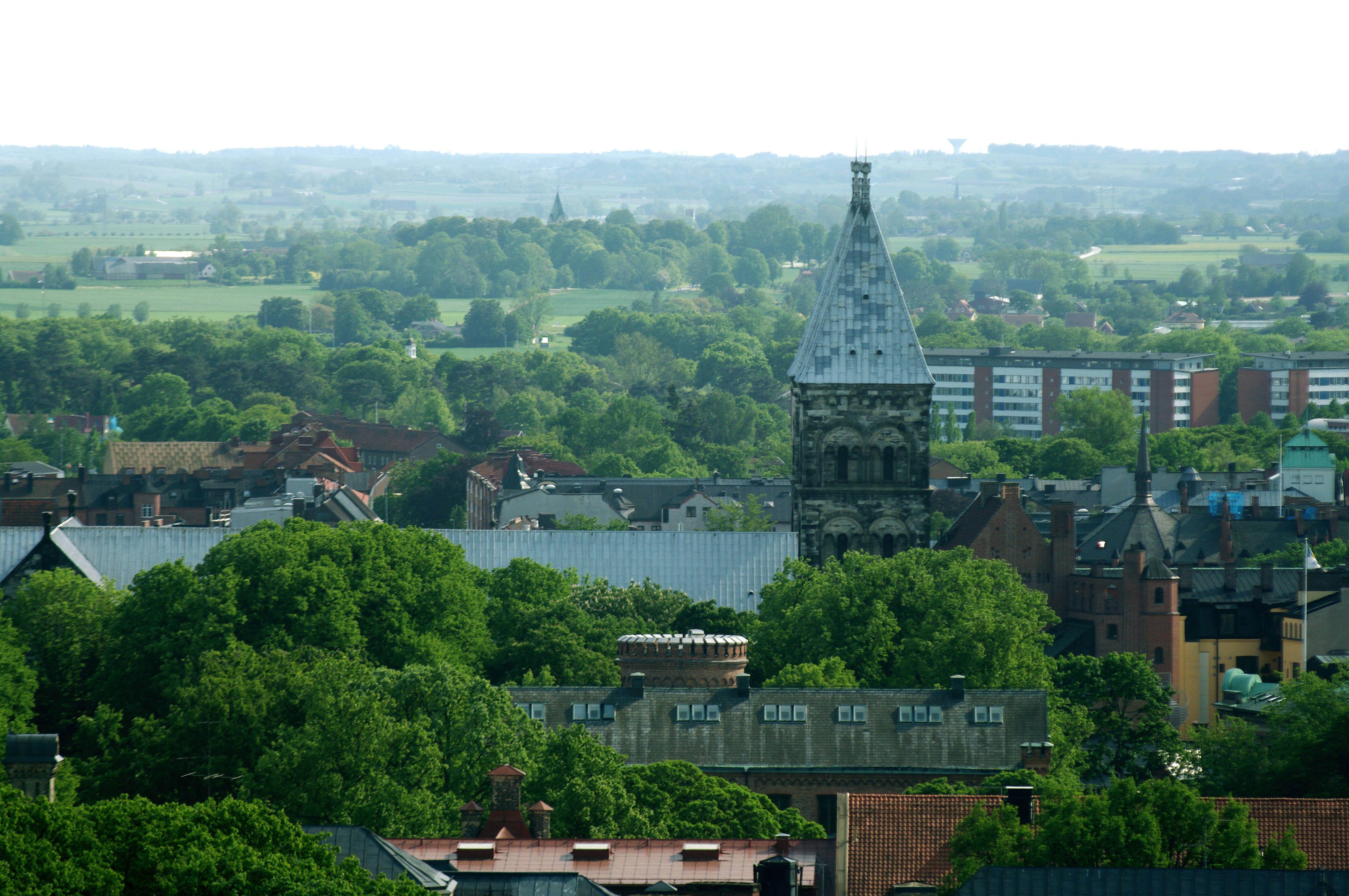 The old vikingplaces Lund and Uppåkra in Skane, Sweden.